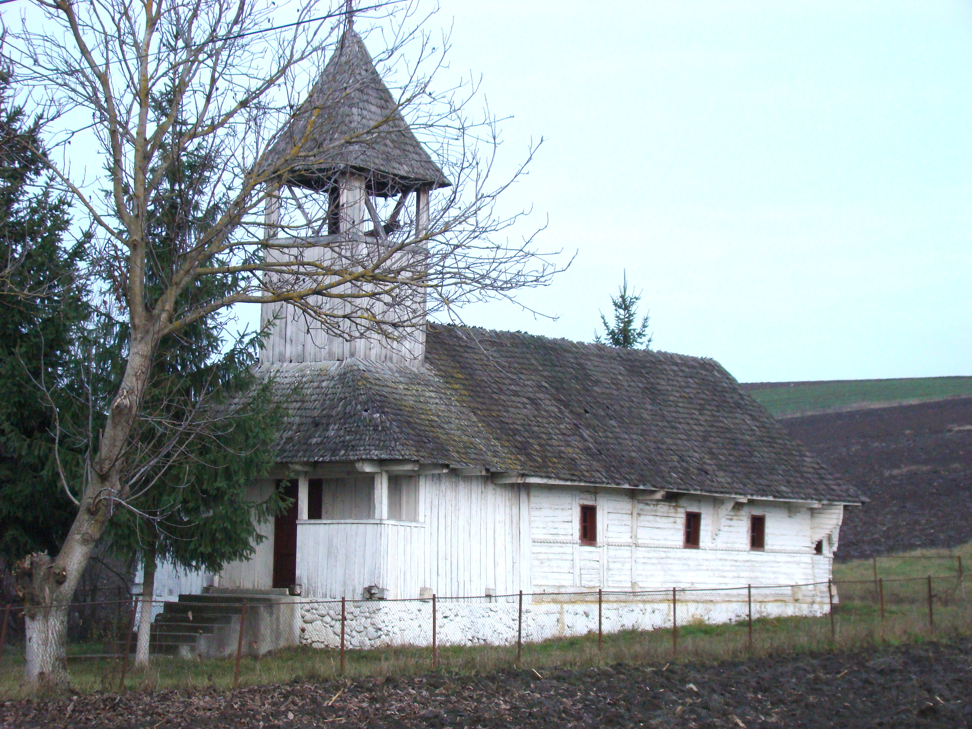 Biserica de lemn „Sf.Arhangheli” din Mădărășeni, județul Mureș